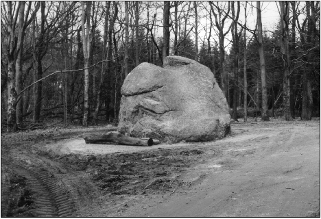 Tirslundstenen. Dansk vandreblokk fra istiden. Foto: Jon Julius Sandal.